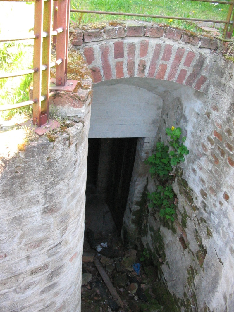 Alte Burg Neustadt-Glewe (Germany), Kellergewölbe des Neuen Hauses